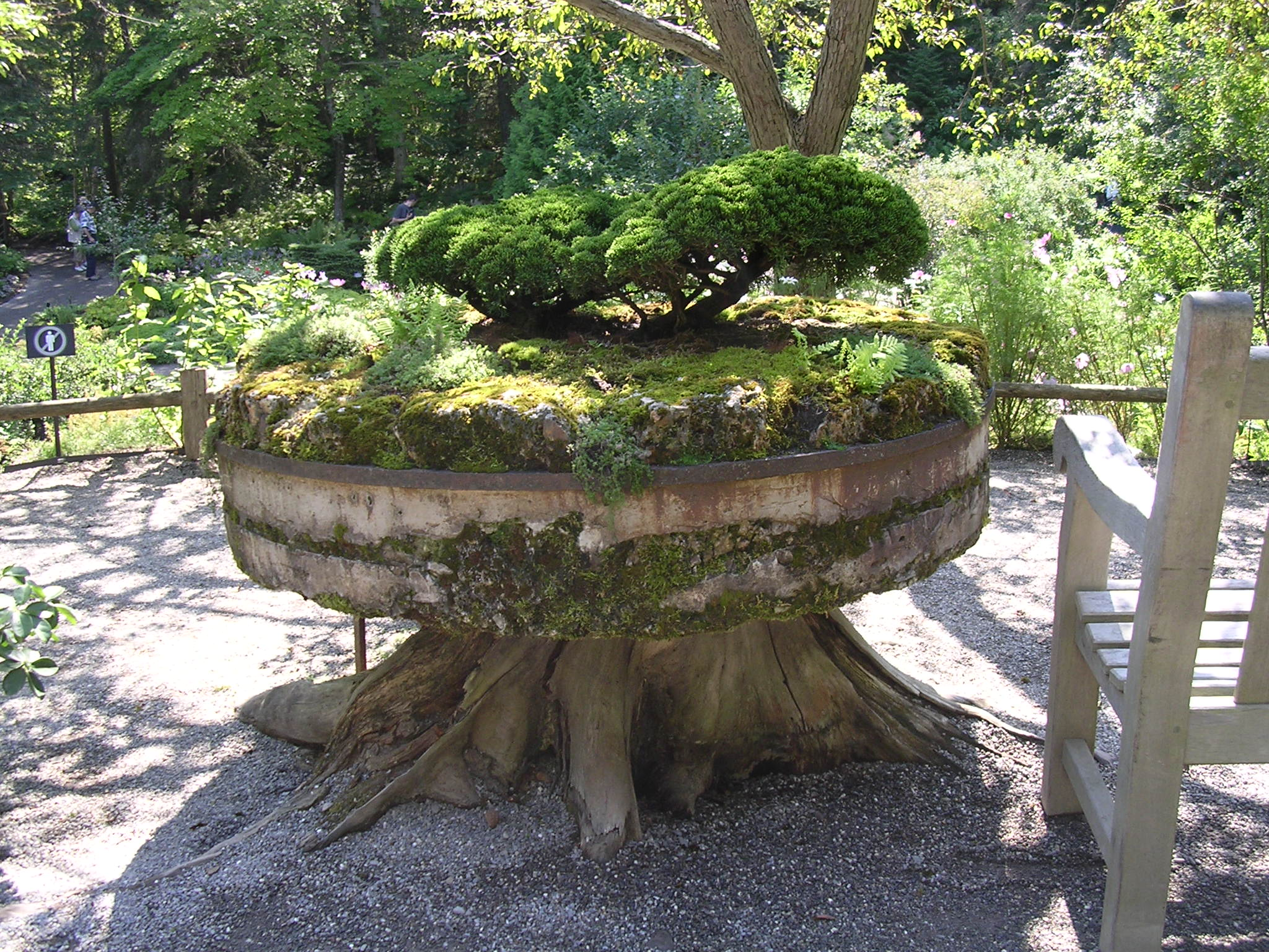 Meule aux Jardins de Métis, parc situé à Grand-Métis (Bas-Saint-Laurent, Québec). Elle provient du moulin banal du ruisseau à la Loutre, à Sainte-Luce (Bas-Saint-Laurent, Québec). Laissée à l'abandon, elle est recouverte de mousses et de lichens. Quelques plantes, dont l'arbuste à l'allure bonsaï, ont été ajoutées. Redford Gardens; moulin à eau; moulin à farine; meule de pierre.